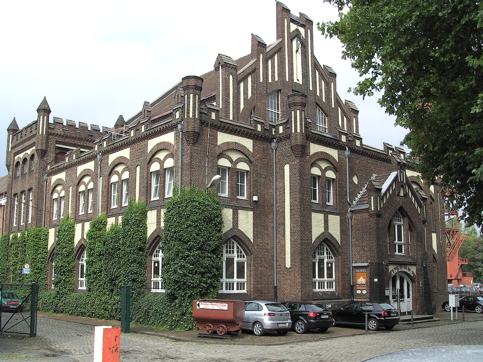 Alte Lohnhalle der Zeche Bonifacius in Essen-Kray (Eigene Aufnahme)